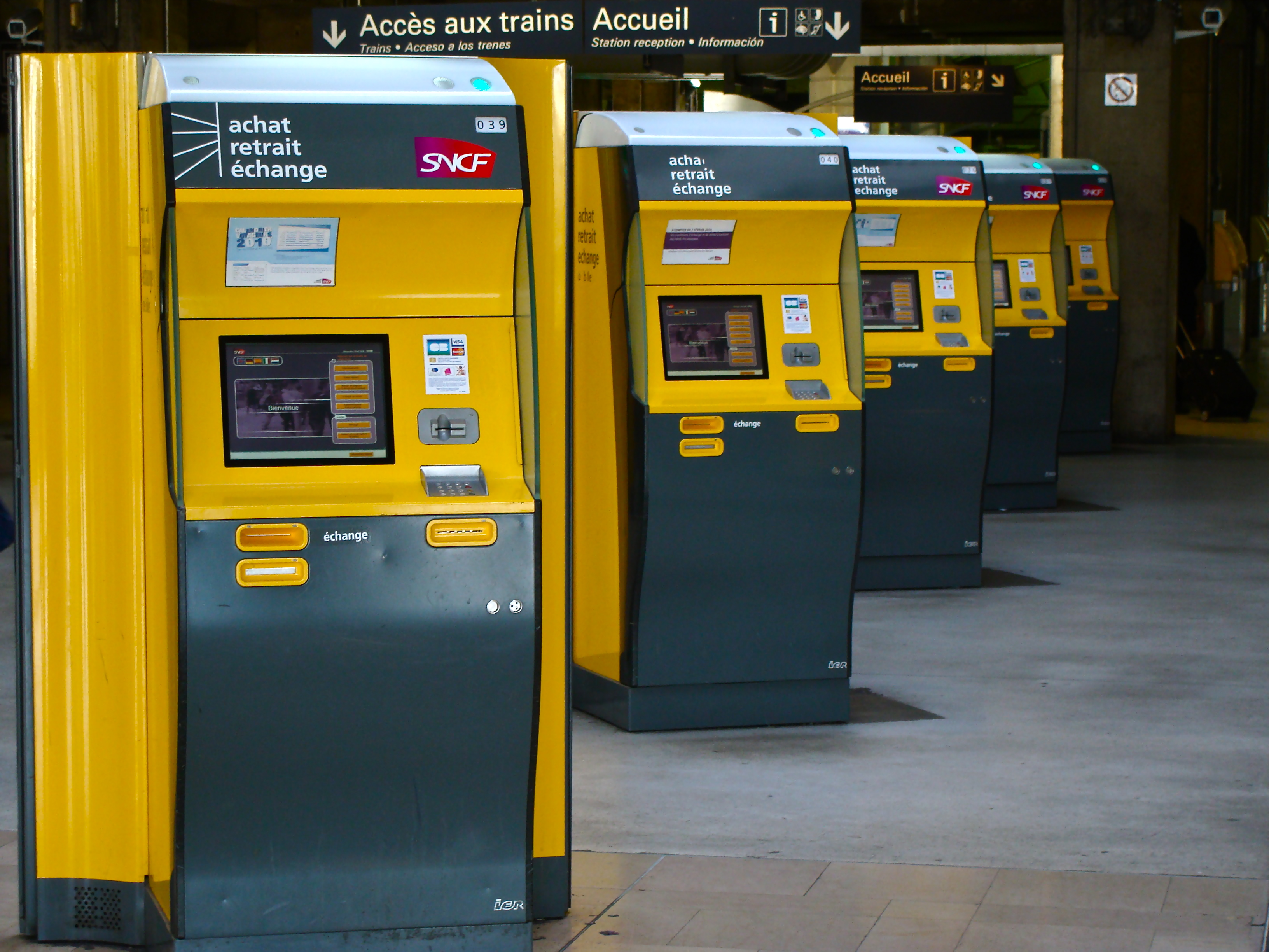 SNCF Tickets machines